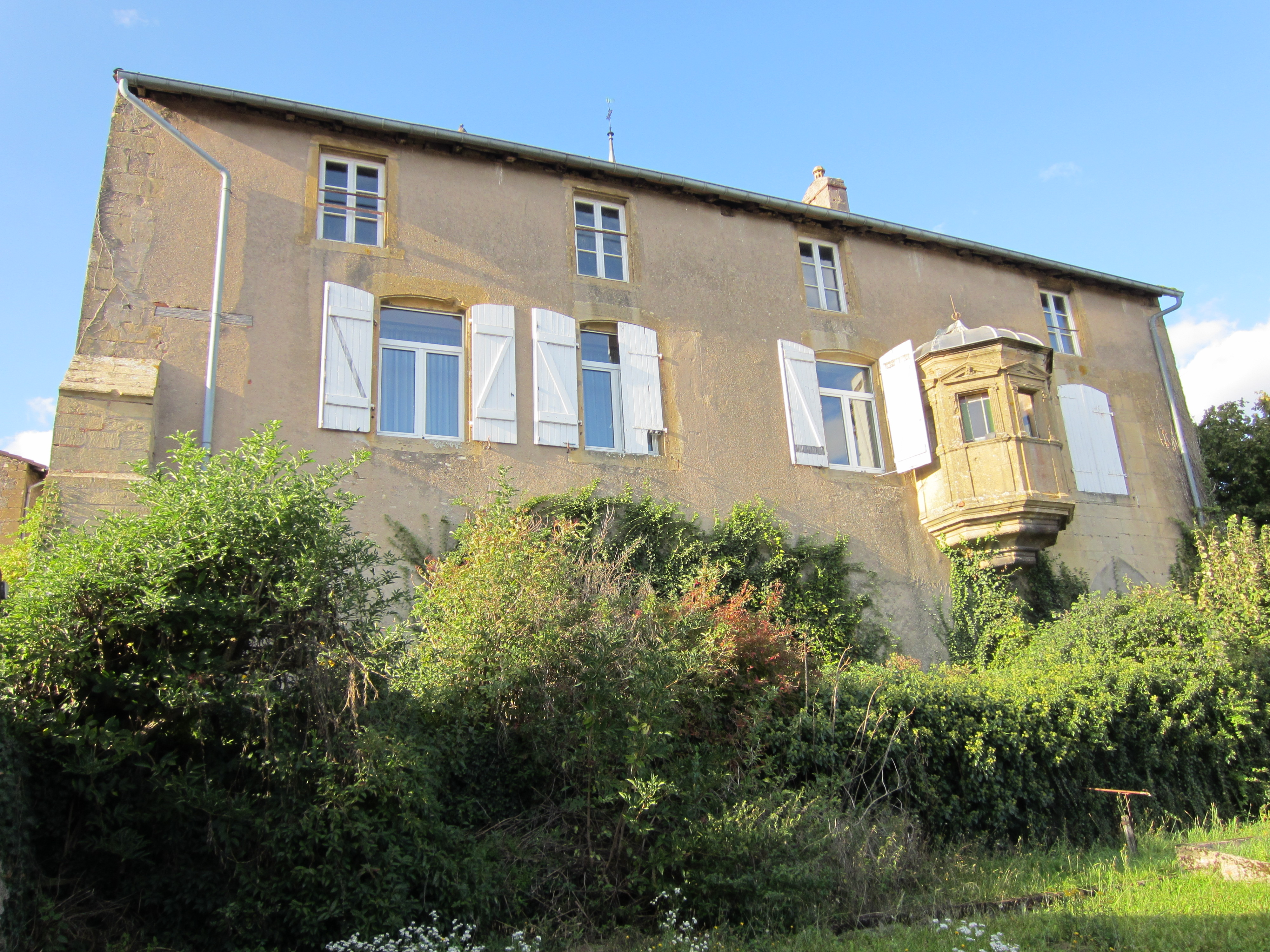 Description ancien prieuré Feves Date15 September 2011Sourcemon appareil photoAuthorAimelaimePermission (Reusing this file) ancien prieuré Feves